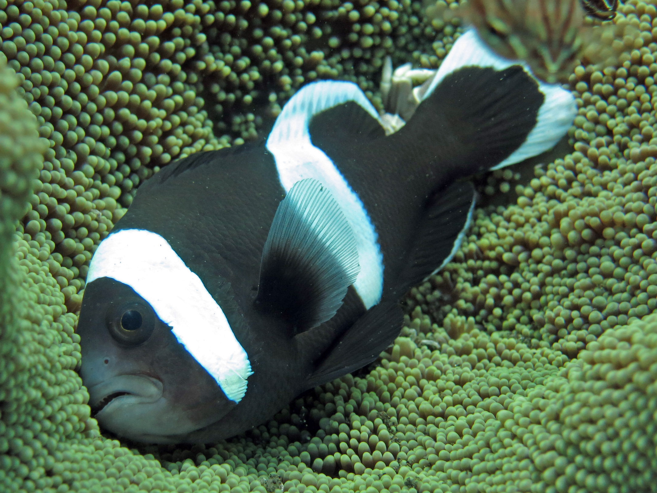 2015 09 Bali 45 suspicious